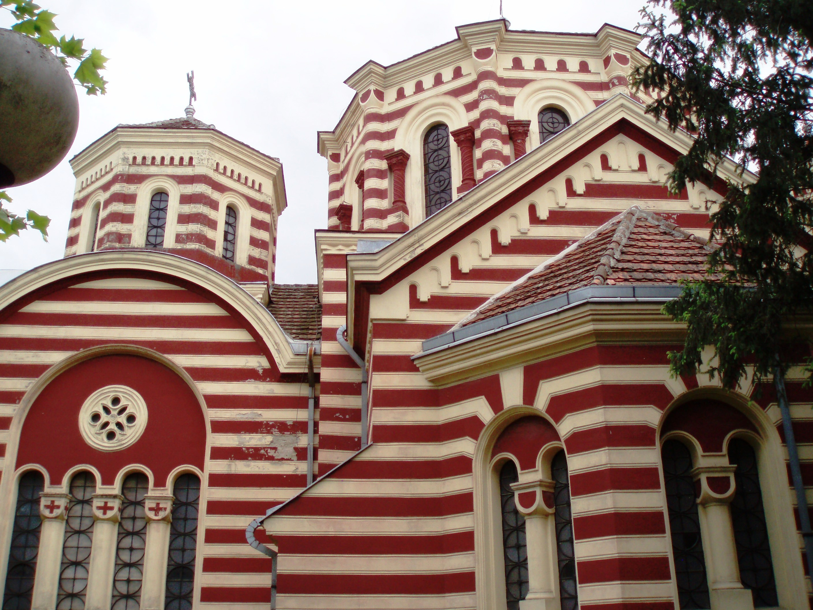 Crkva u Orlovatu, Desna strana, arh. D.Brašovan, autor fotografije: Nicolo